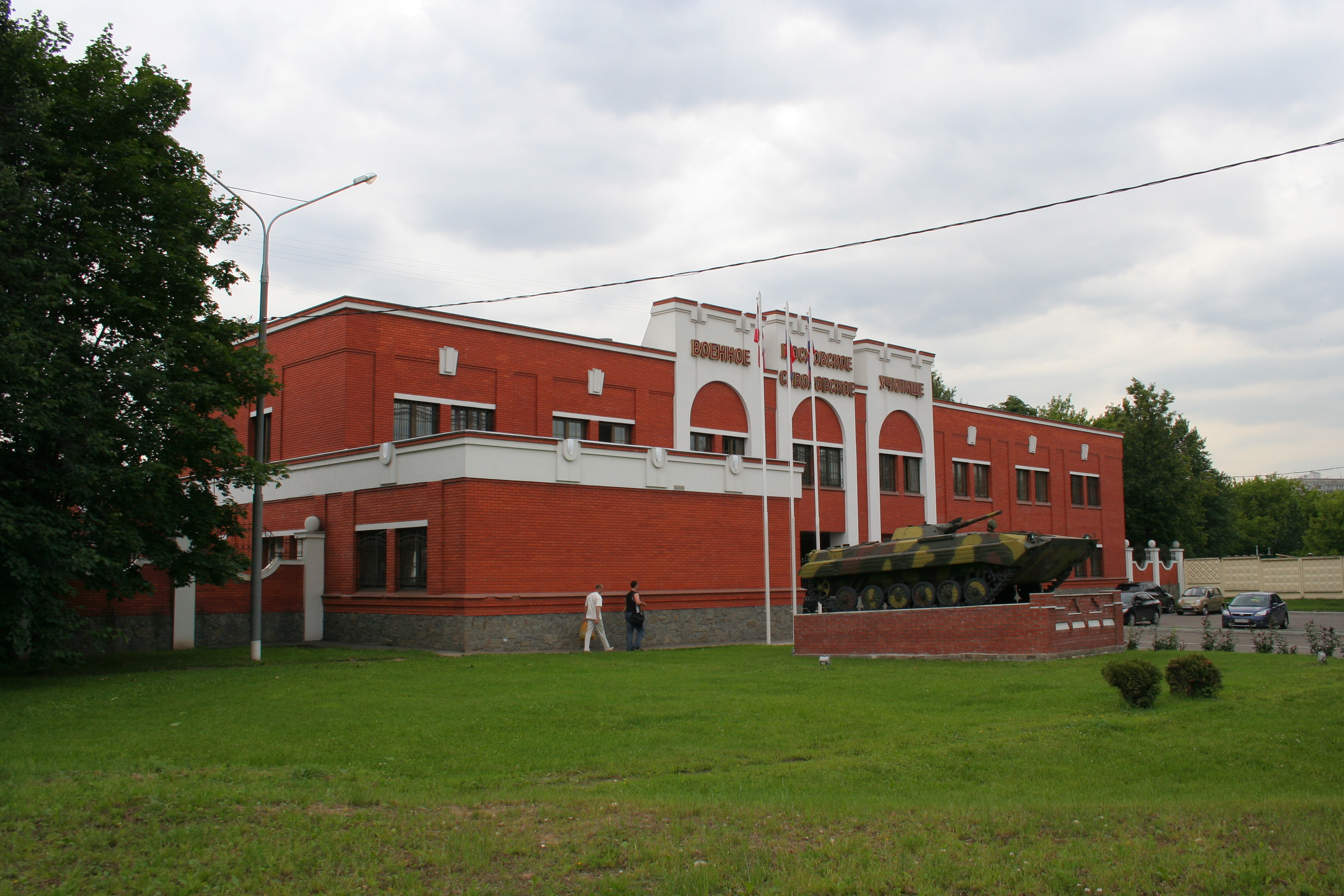 Die Suworow-Militärschule in Moskau. Blick von außen.